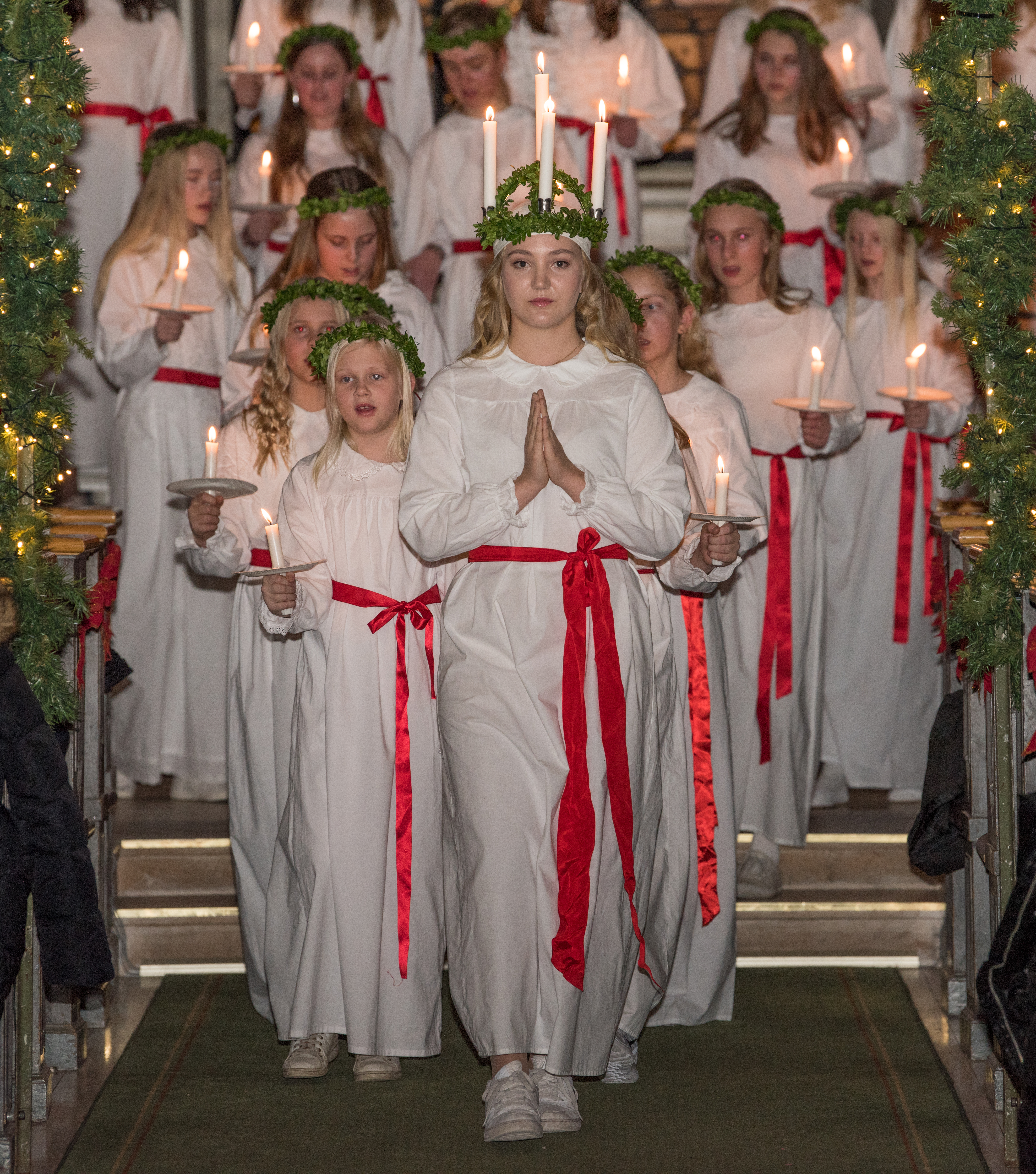 Lucia Vaxholm 2017 Lucia in Vaxholm, Stockholm, Sweden 2017